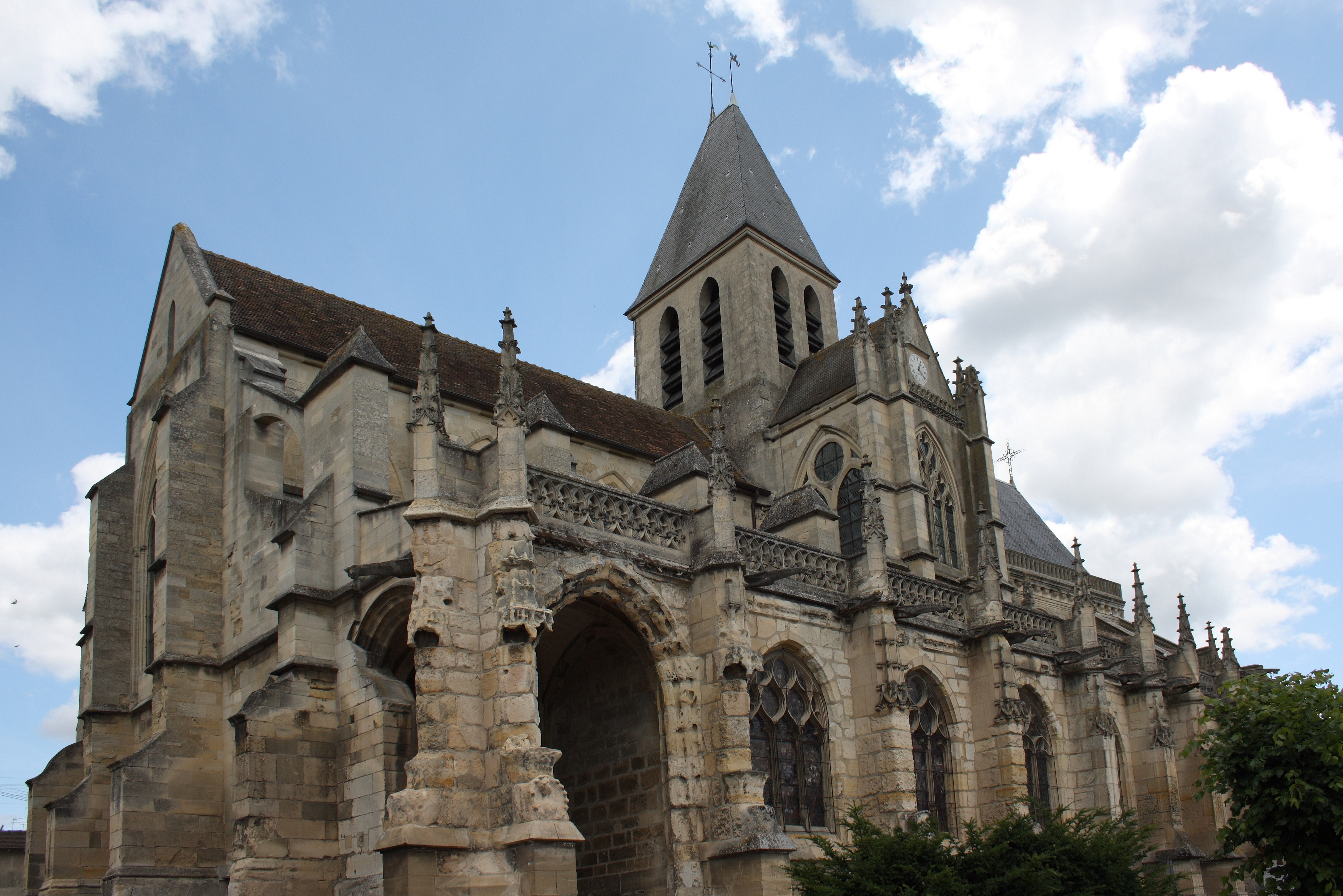 Katholische Pfarrkirche Saint-Martin in Triel-sur-Seine im Département Yvelines (Île-de-France/Frankreich), Ansicht von Südwesten